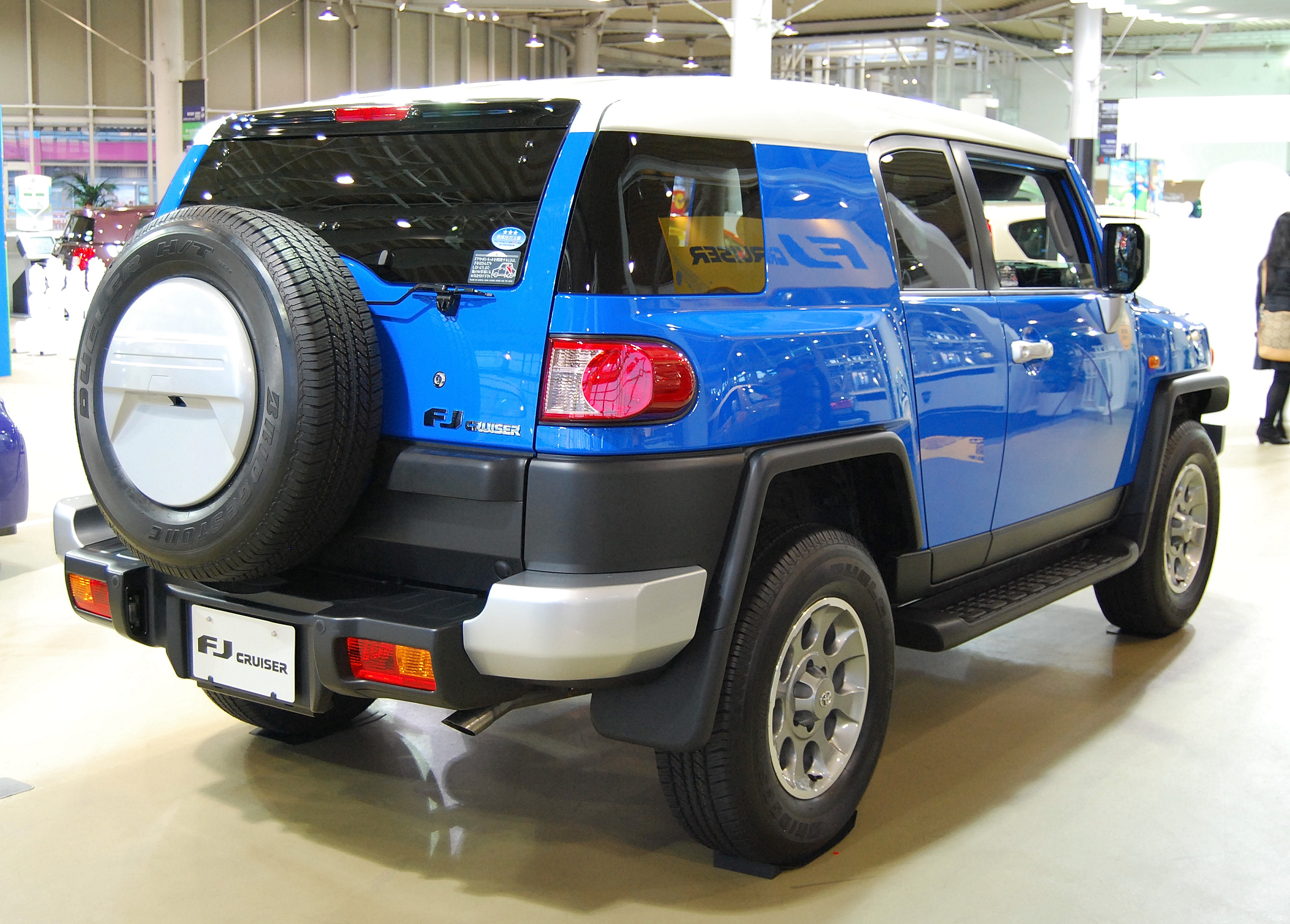 トヨタFJクルーザー日本仕様、後部